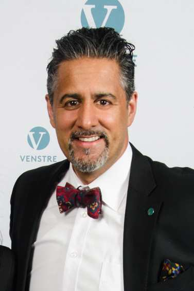 Abid Raja.